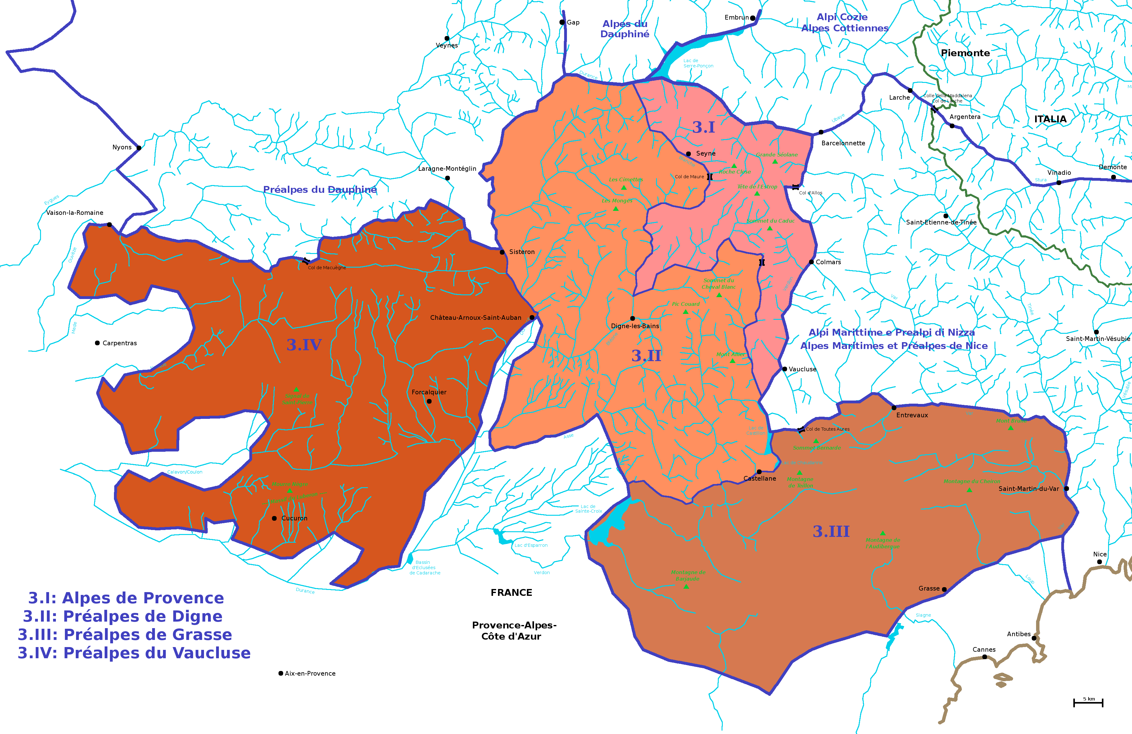 Carta schematica della sezione Alpi e Prealpi di Provenza delle Alpi (secondo la SOIUSA). In evidenza la rete idrografica, i confini politici ed ammnistrativi, i principali centri abitati, le vette principali.